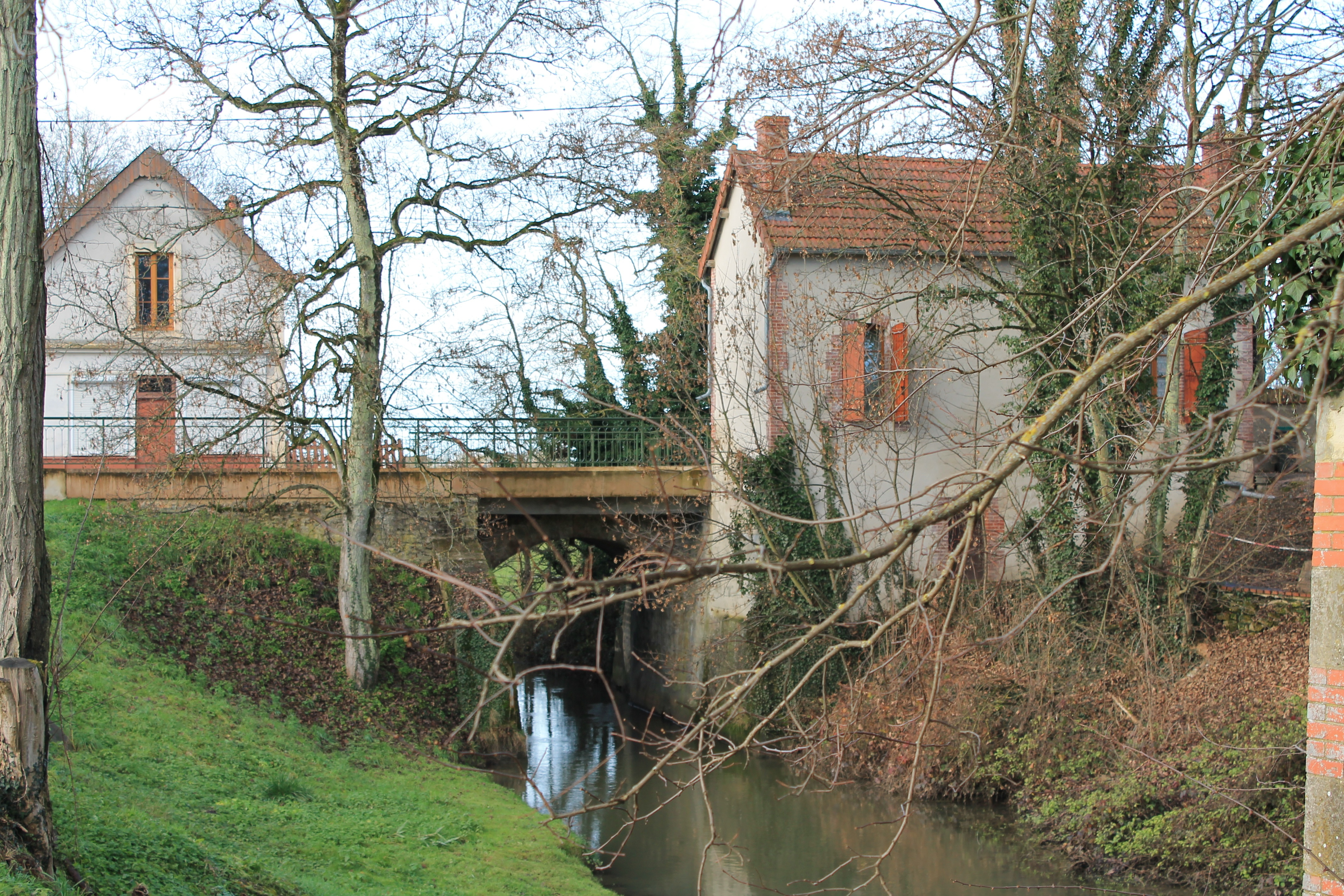 Une maison à Grossouvre, avec pont